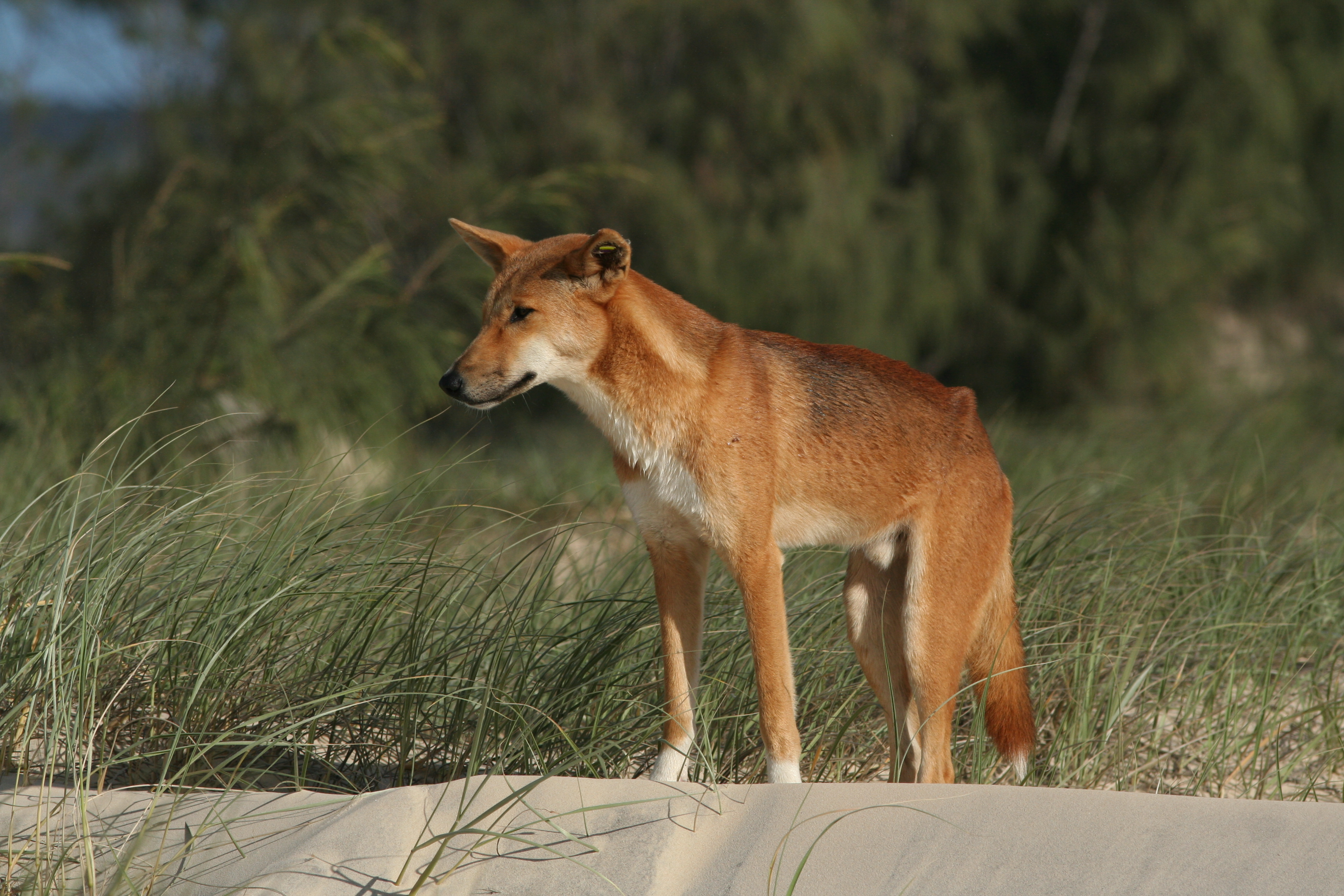 Dingo, Canis lupus dingo, male